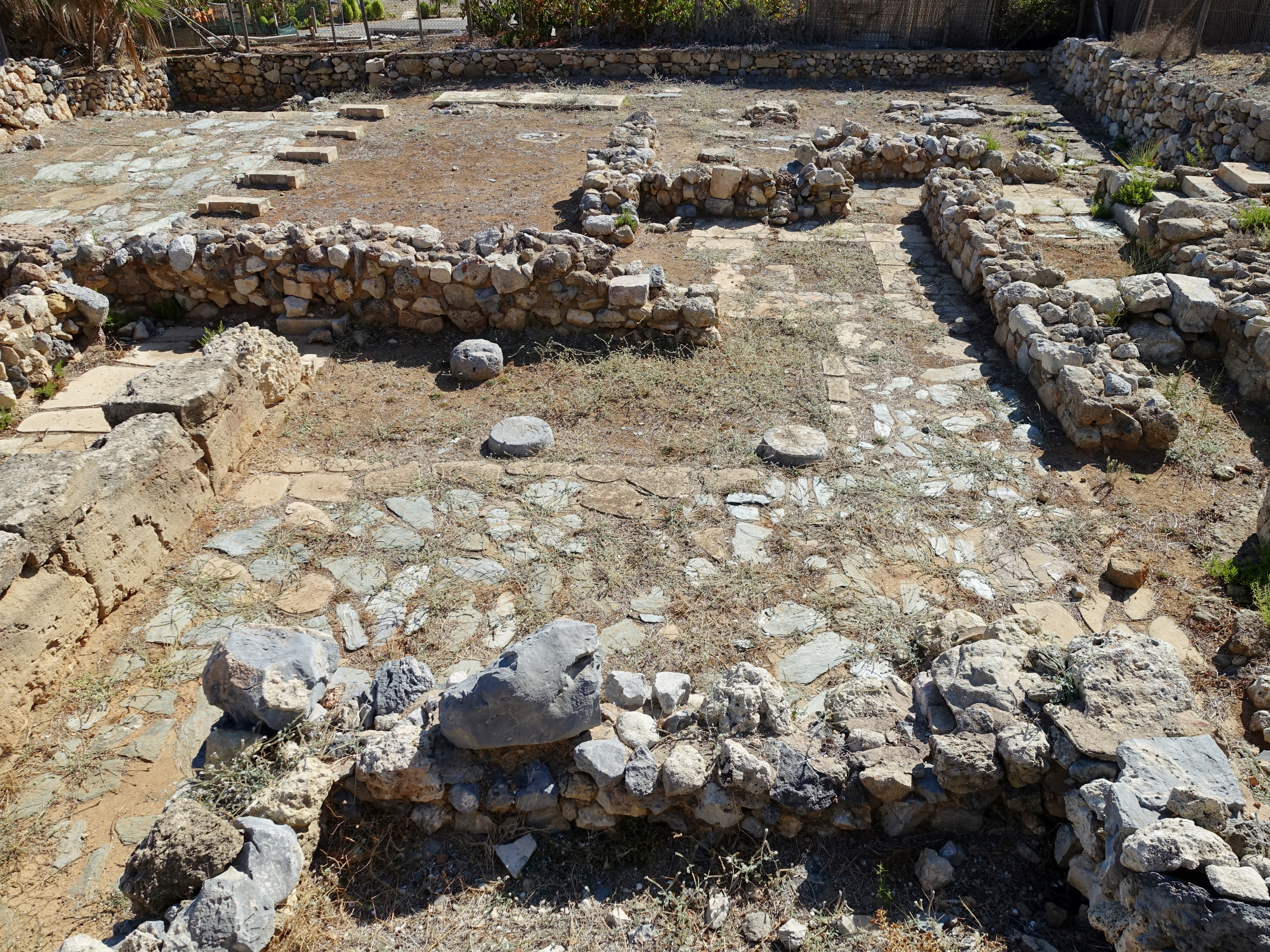 Minoische „Villa der Lilien“ in Amnissos bei Iraklio, Kreta, Griechenland